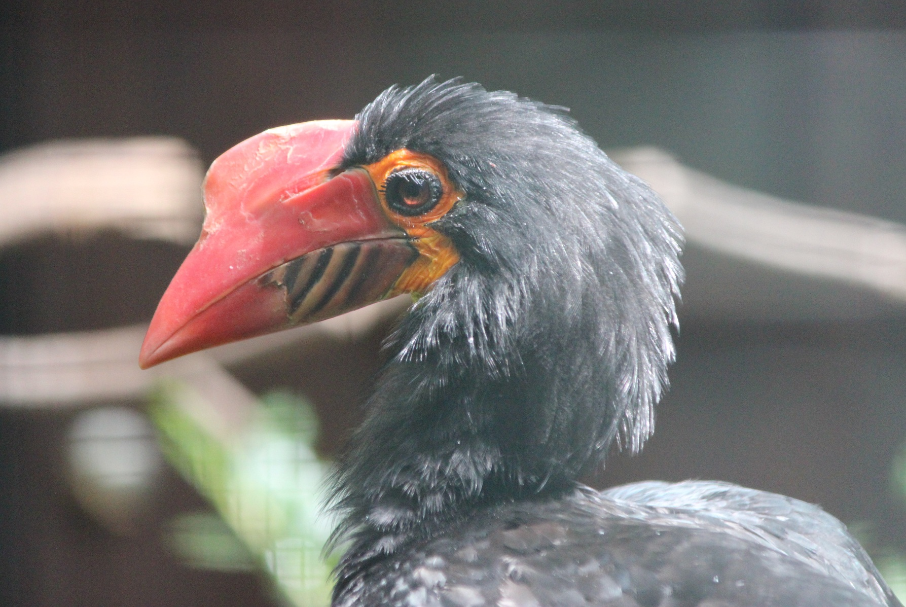 es gibt noch kein Foto von diesem Hornvogel, aufgenommen bei einem Besuch in Walsrode Vogelpark Deutschland